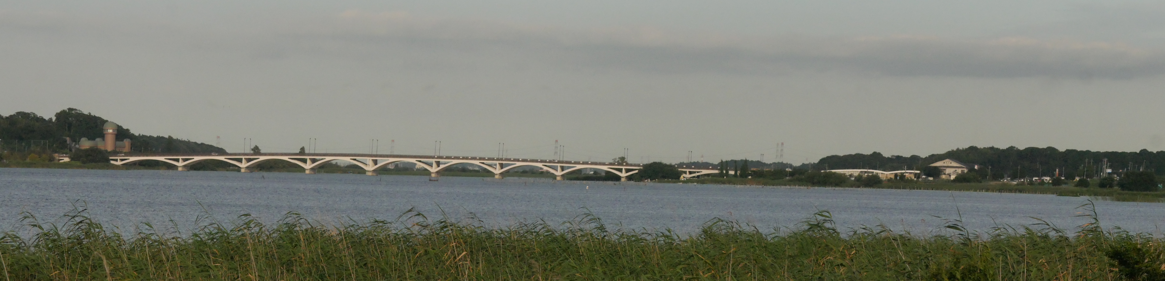 手賀大橋 (Tega Bridge)